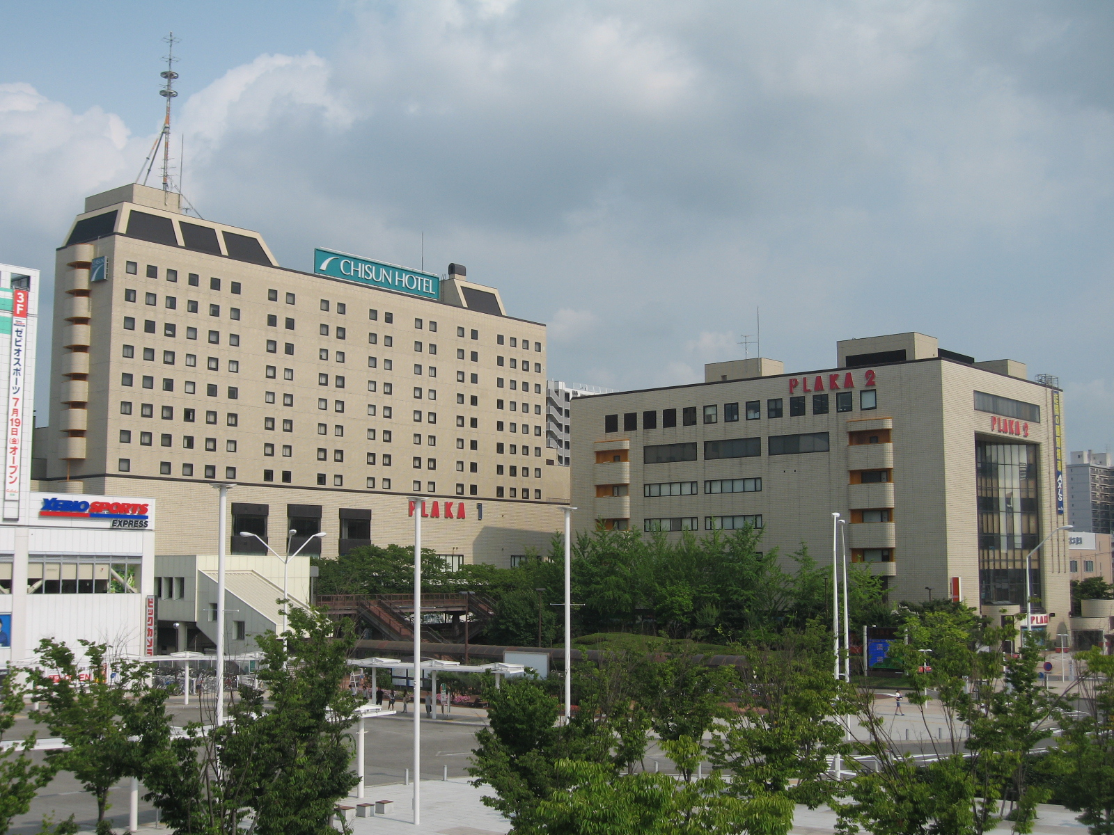 新潟市中央区。プラーカ1とプラーカ2の画像。